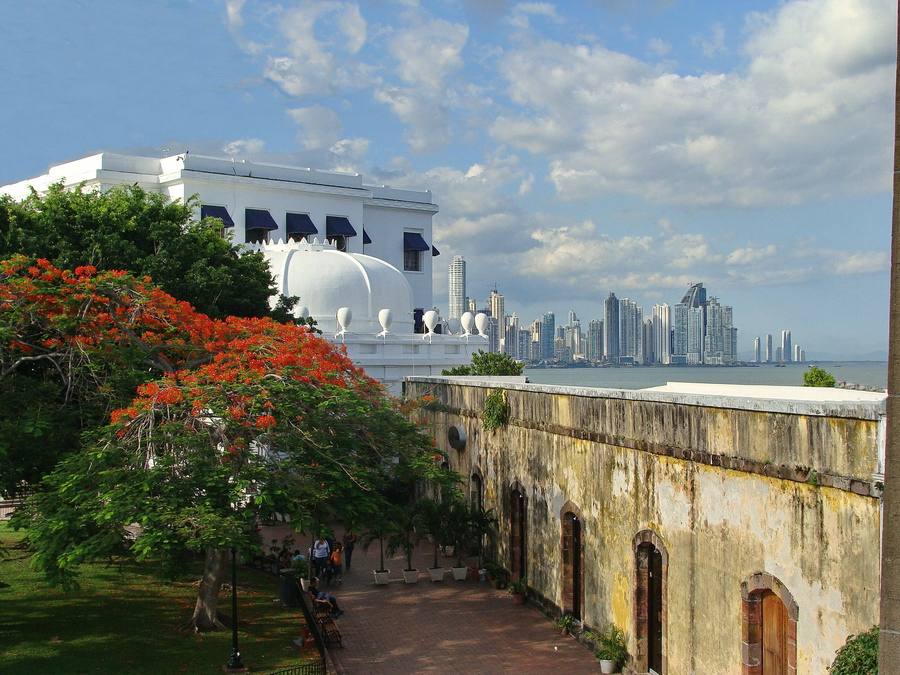 Vista de las Bovedas y su adarve